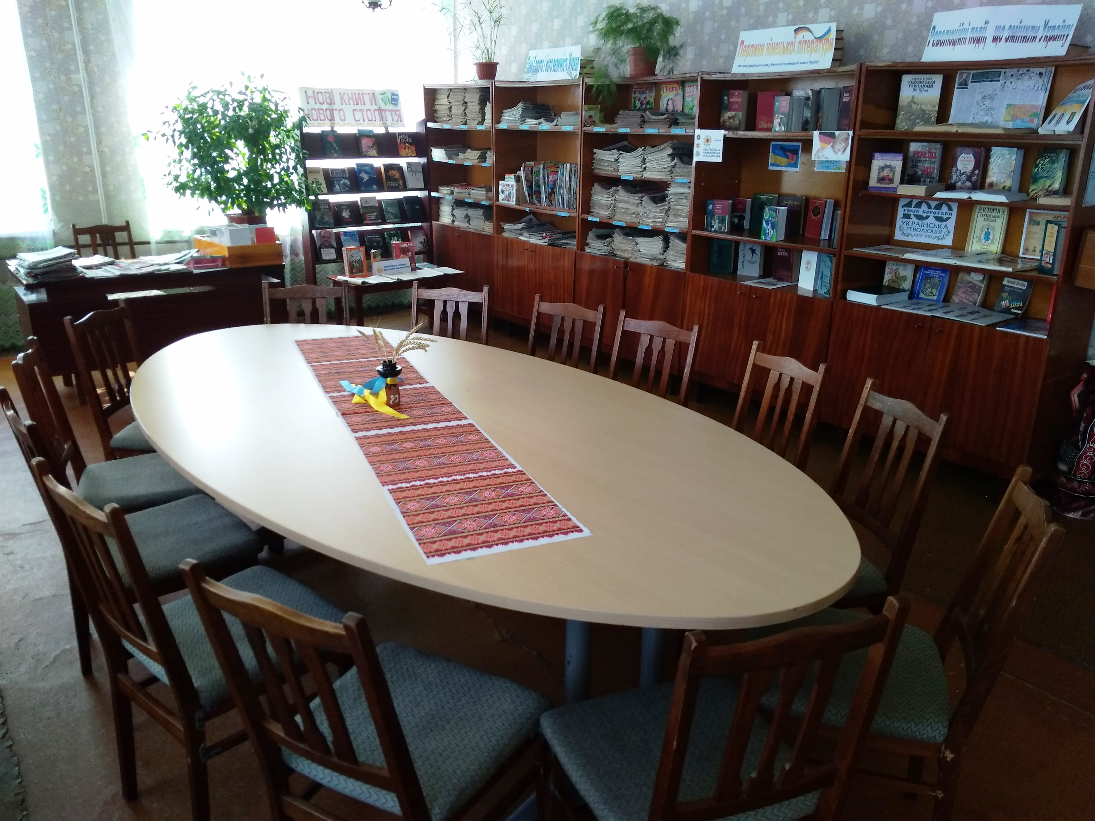 приміщення